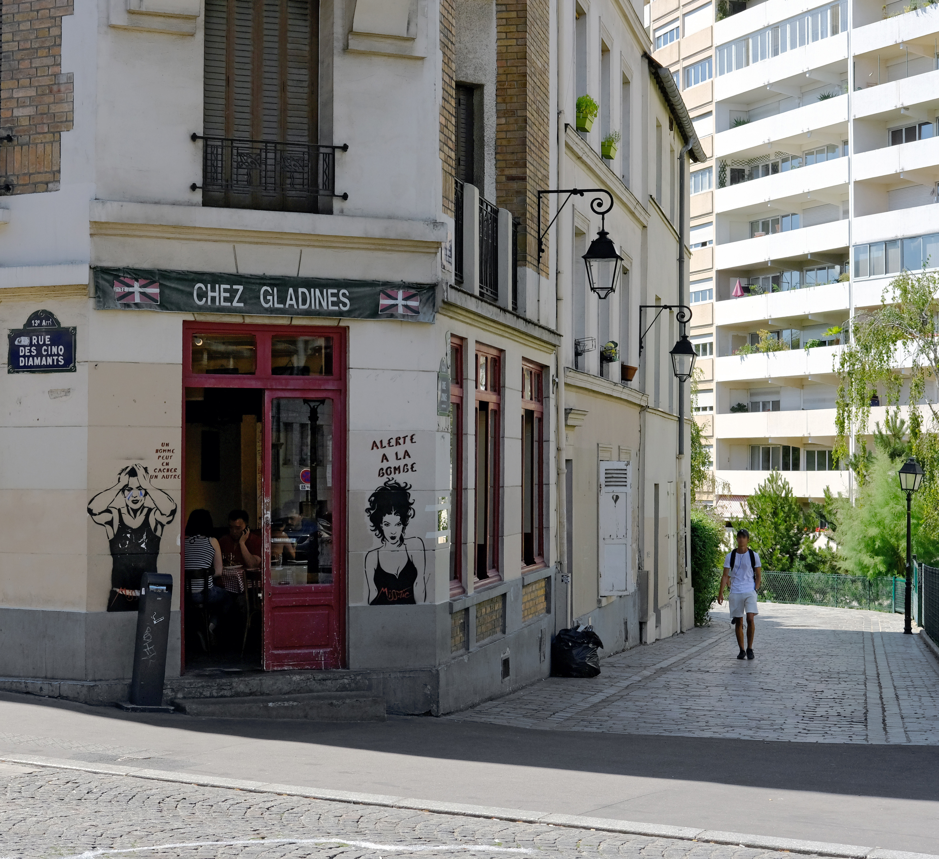 Rue des Cinq-diamants et rue Jonas - Paris XIII